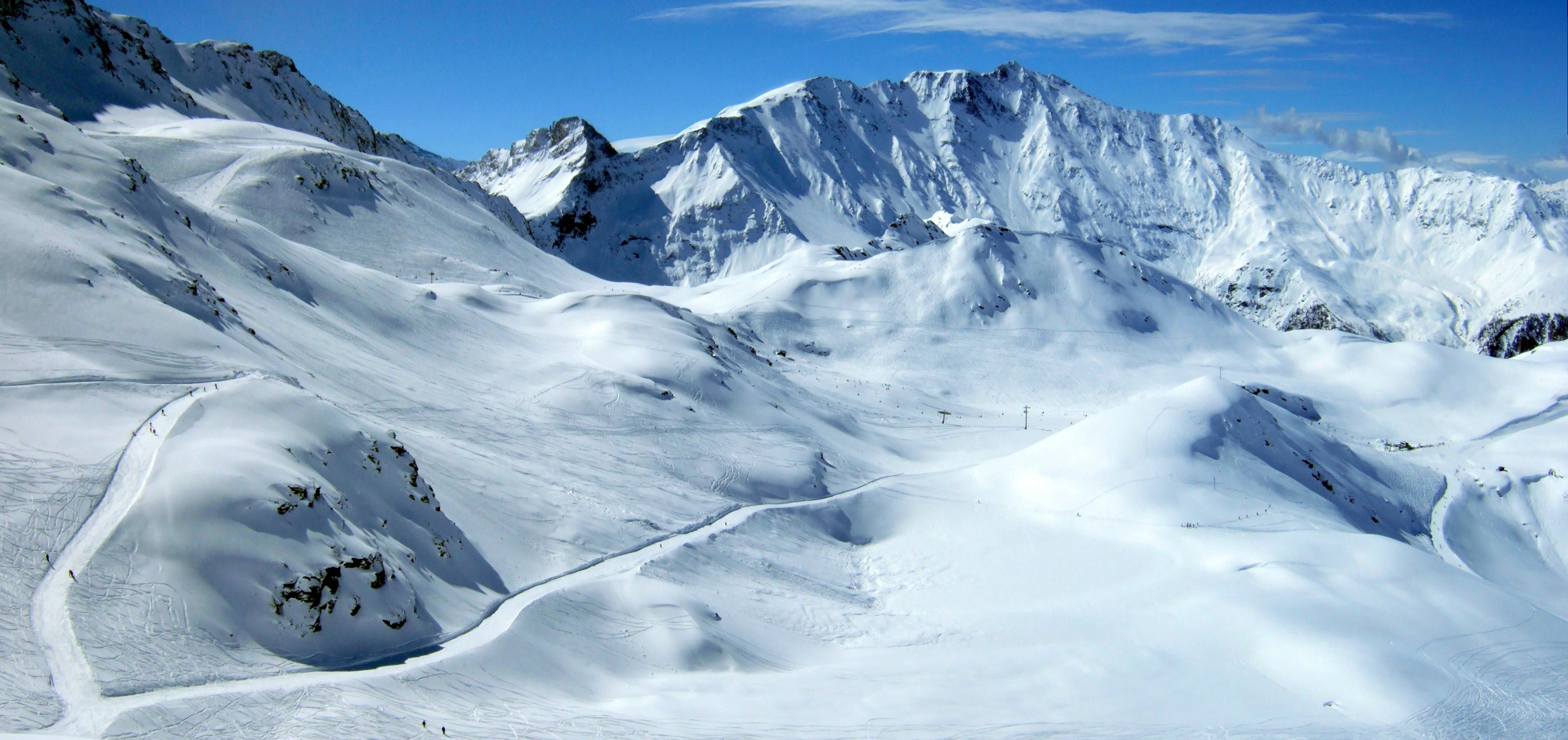 Photo prise du bas du téléphérique de l'Aiguille rouge. On peut voir au premier plan la piste des Arandelières, au second plan de télésiège du Grand Col et enfin le massif de Bellecôte sur lequel se situe le glacier de la Plagne.